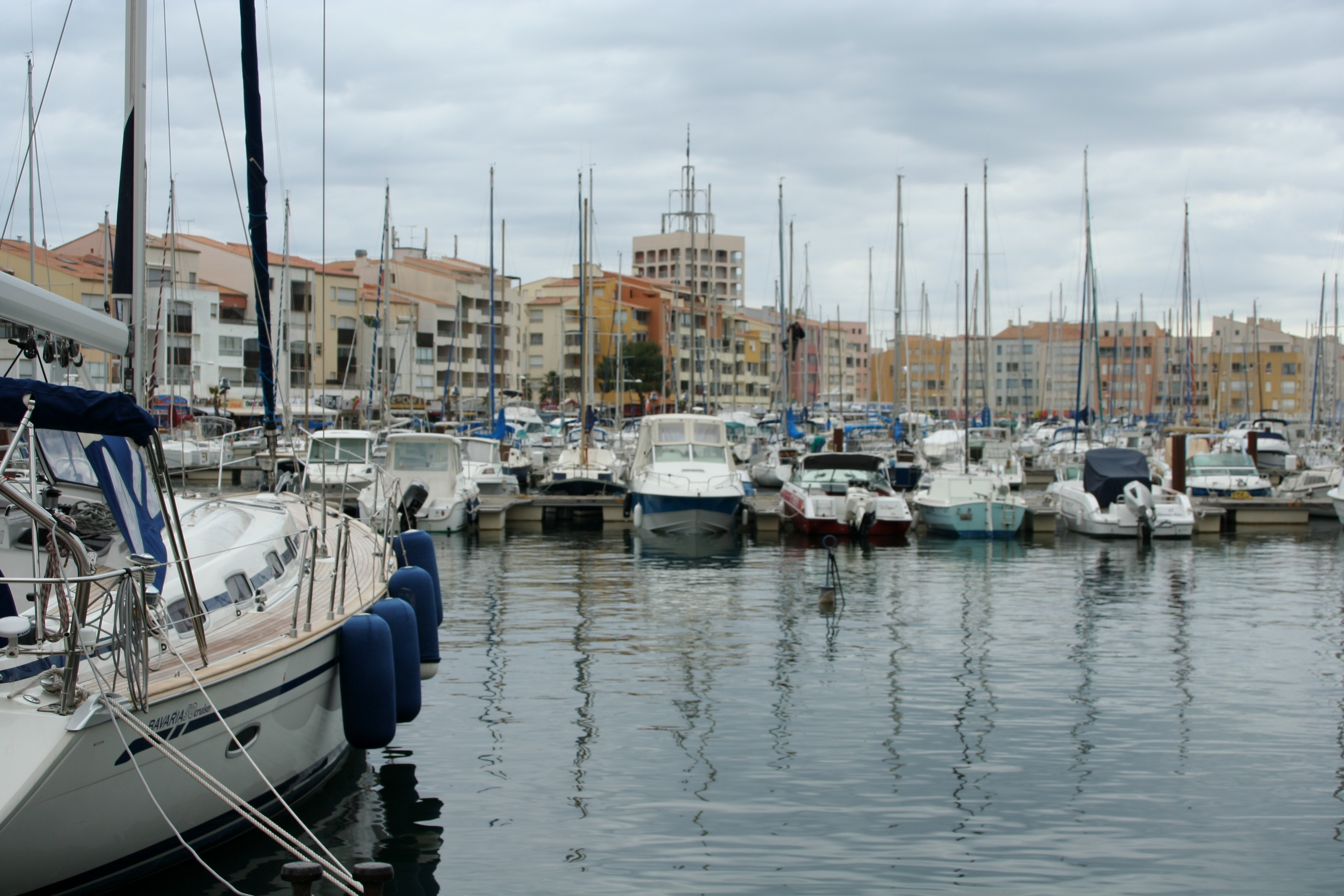 Port du Cap-d'Agde, Hérault